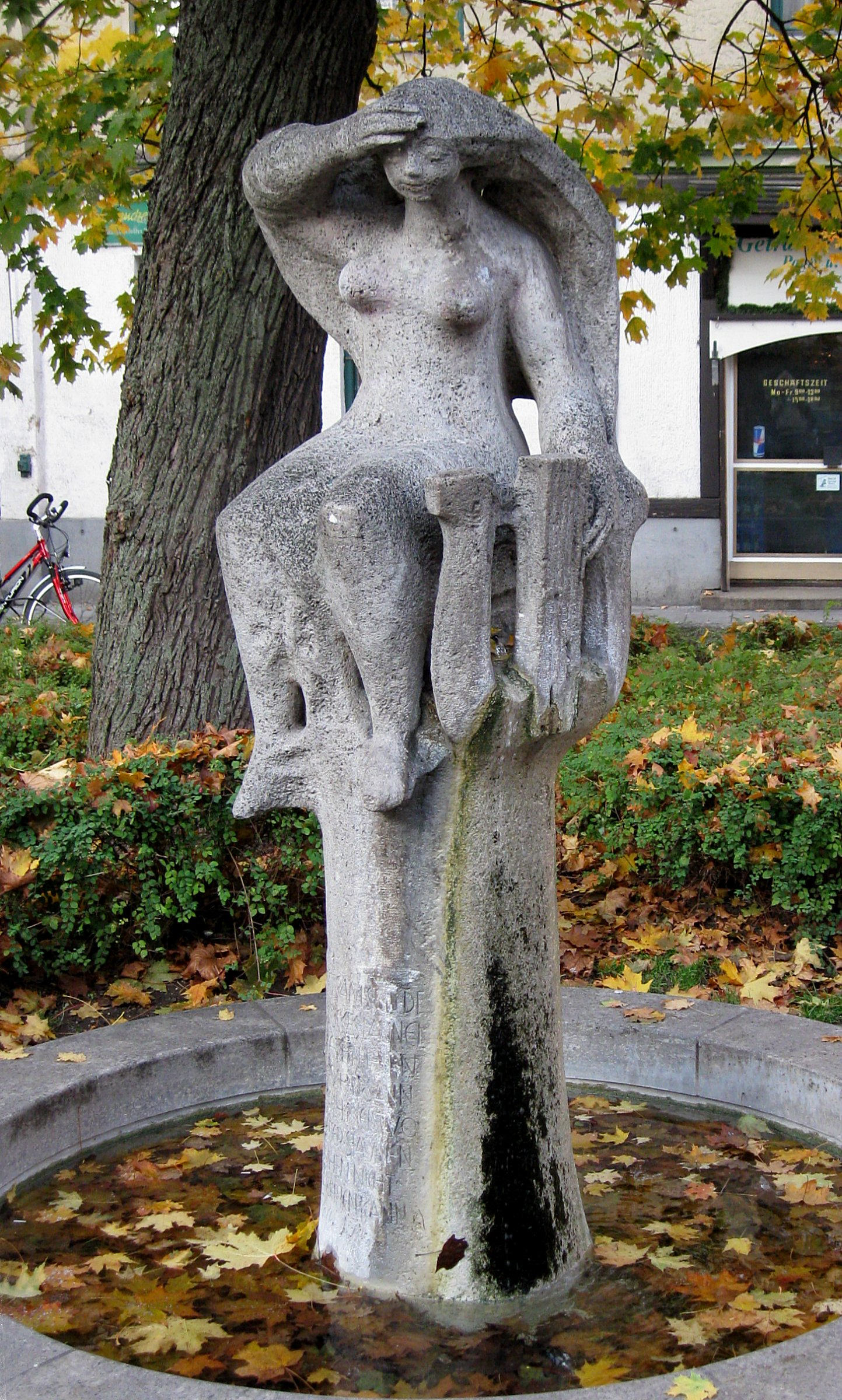 Wedekindbrunnen, Wedekindplatz, München-Schwabing, Ferdinand Filler, 1959